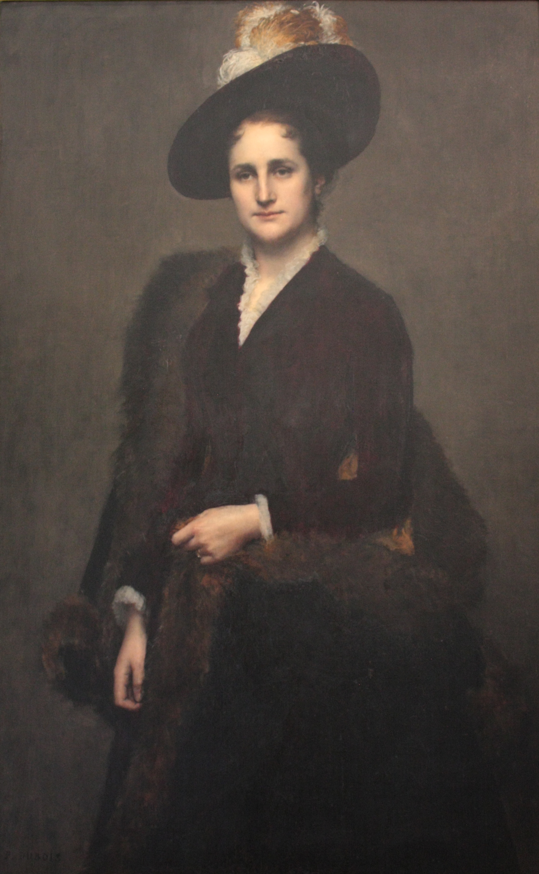 Hélène Perier-Vitet (1854-1912), épouse de Jean Casimir-Perier par Paul Dubois (1829-1905)